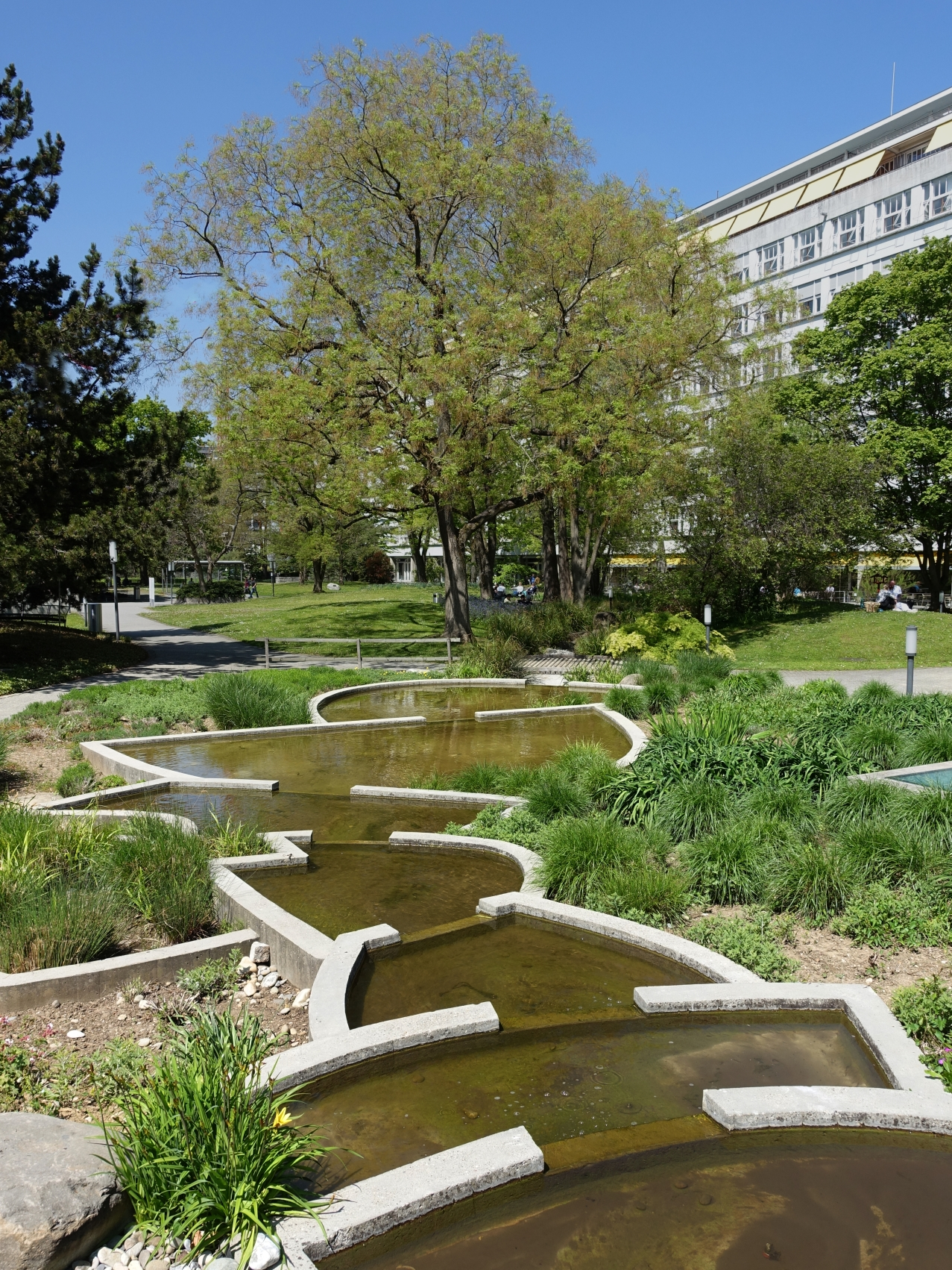 Helene Balmer-Gerber, Bildhauerin. Brunnenanlage (1976-80) im Garten des Universitätsspital, Basel